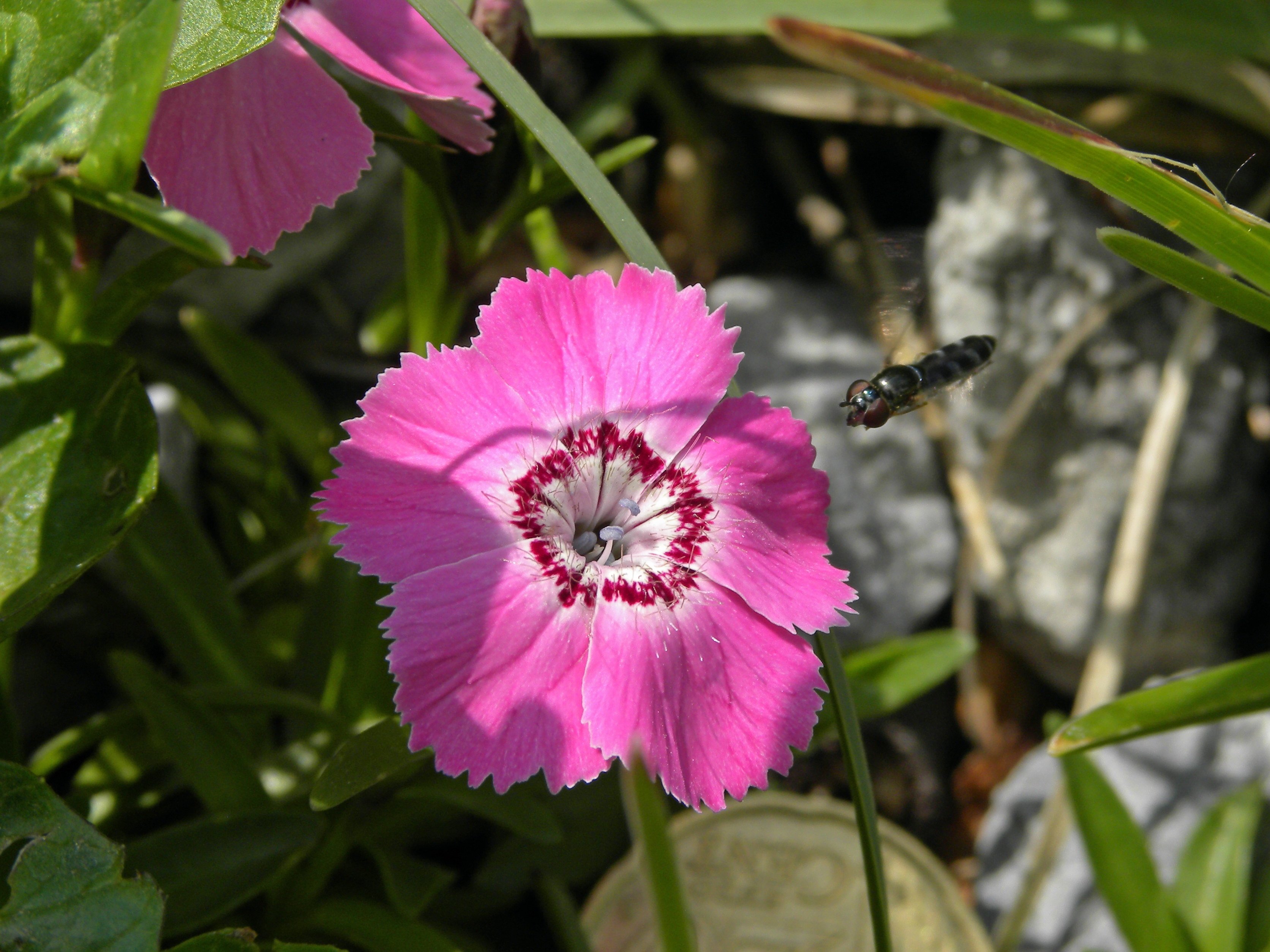 Ostalpen-Nelke (Dianthus alpinus) auf der Rax